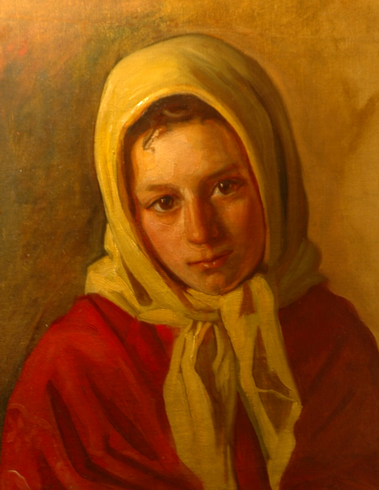 Pablo Puchol retrato de mujer